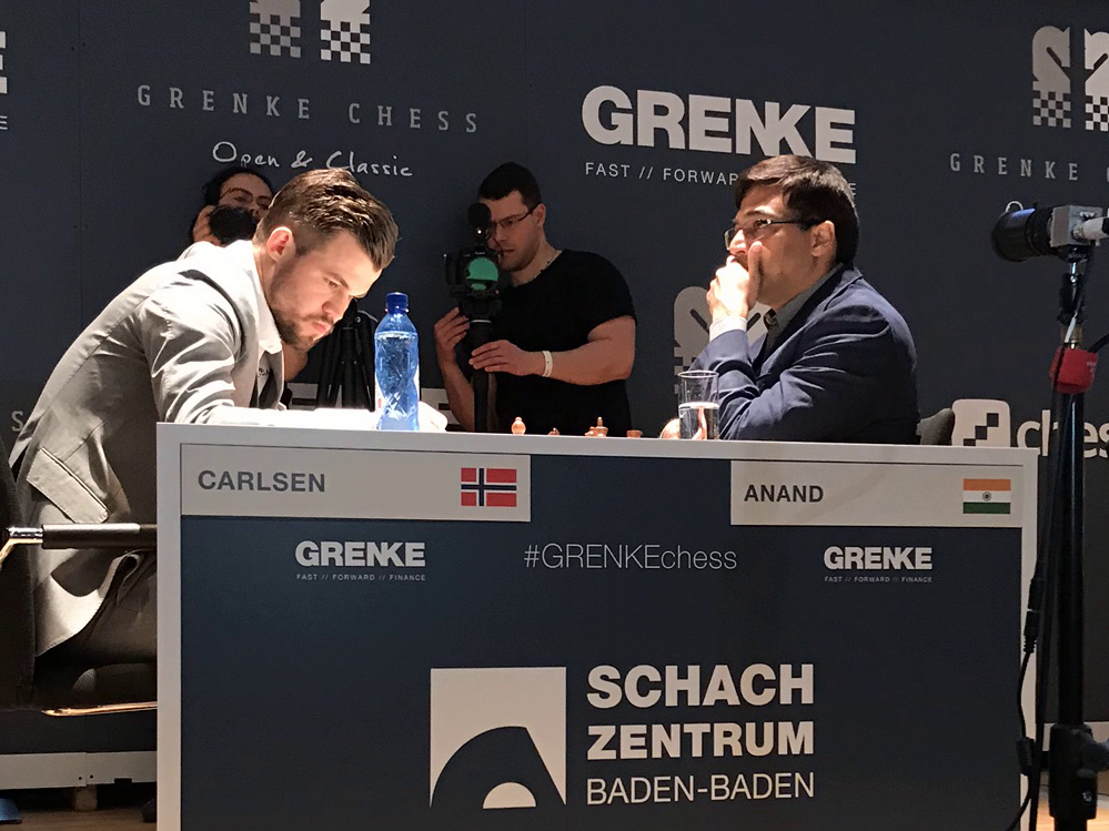 Magnus Carlsen - Viswanathan Anand, Runde 3 der Grenke Chess Classic 2019 in Karlsruhe.